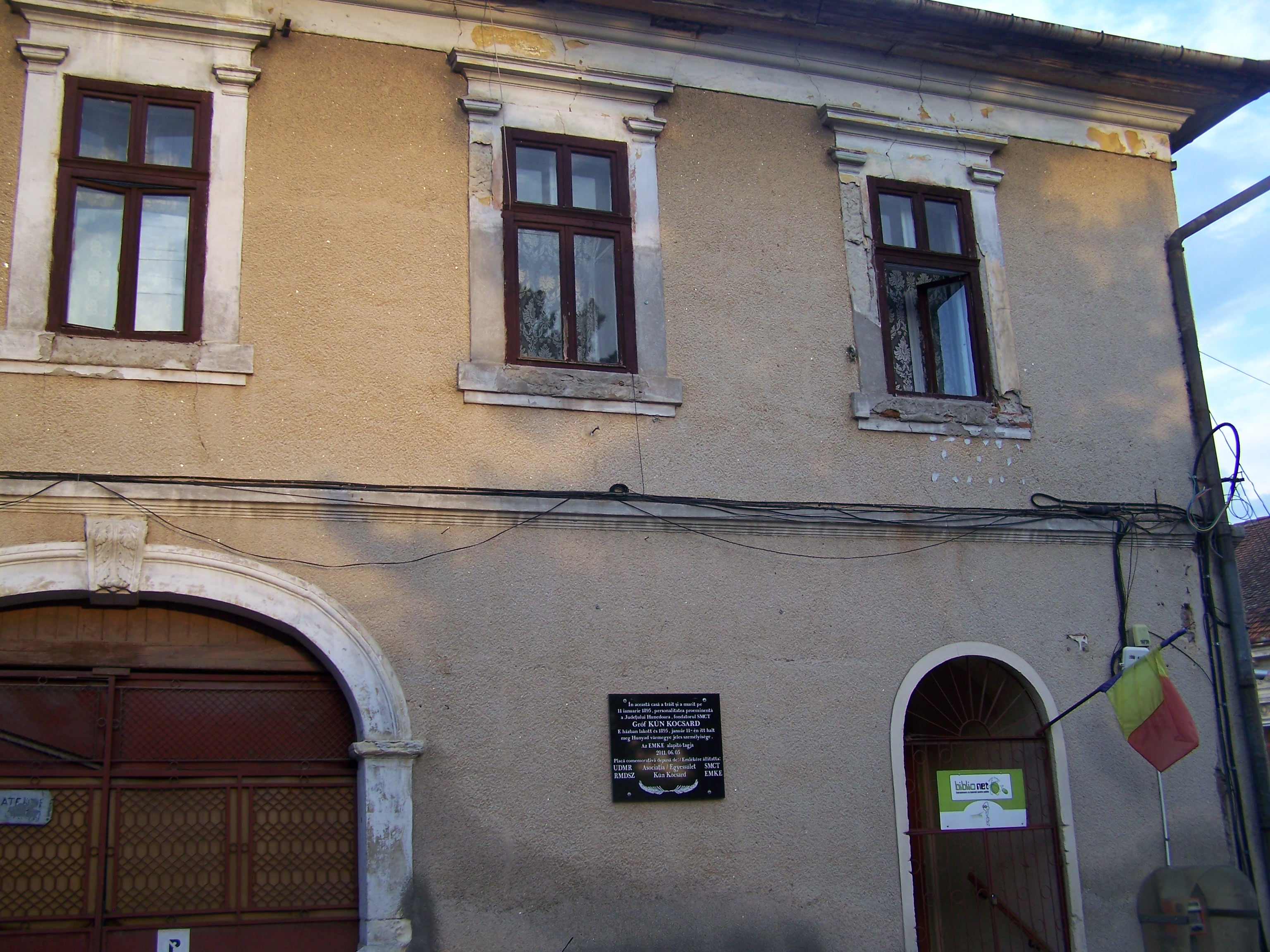 Casa memoriala Kocsard Kun din Orastie.